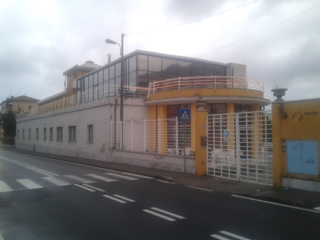 Casa del Balilla (Massa), vista da via Marina Vecchia